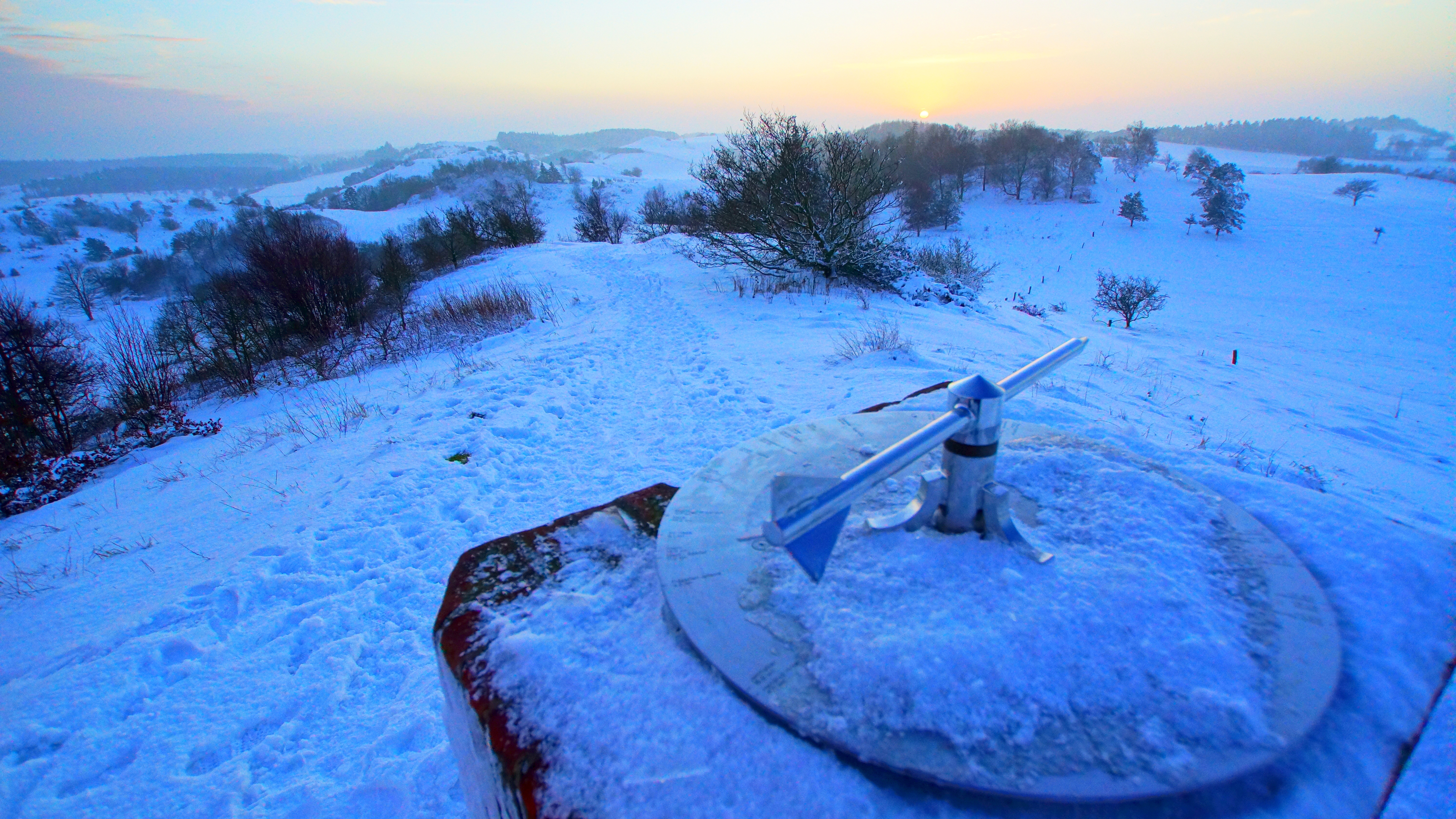 Agri Bavnehøj, vinter 2